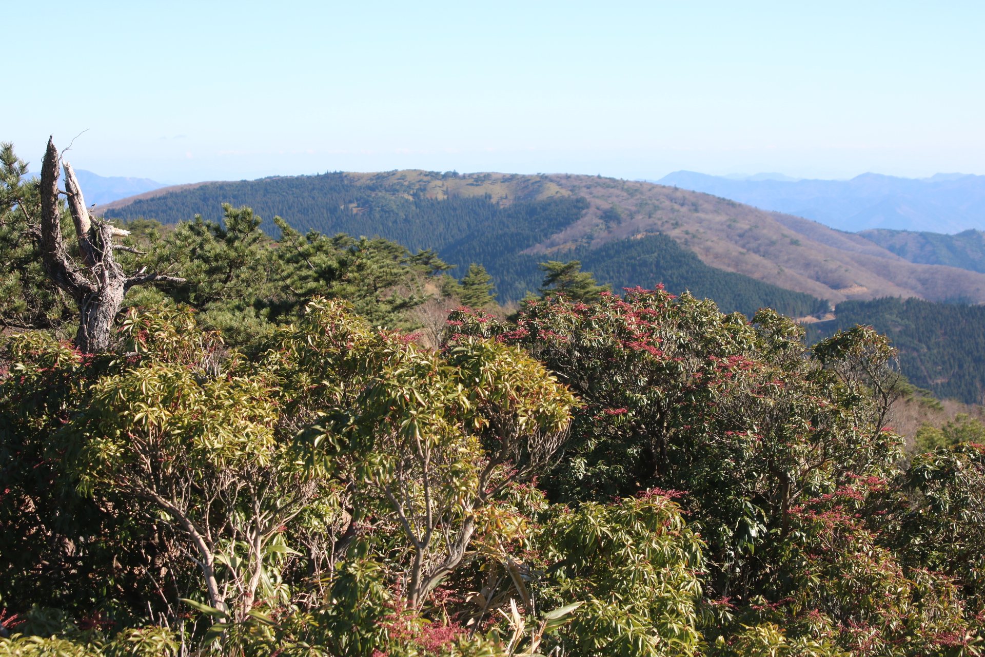 千町ヶ峰から段ヶ峰を望む